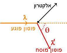 ההסבר לאפקט קומפטון ברמה החלקיקית